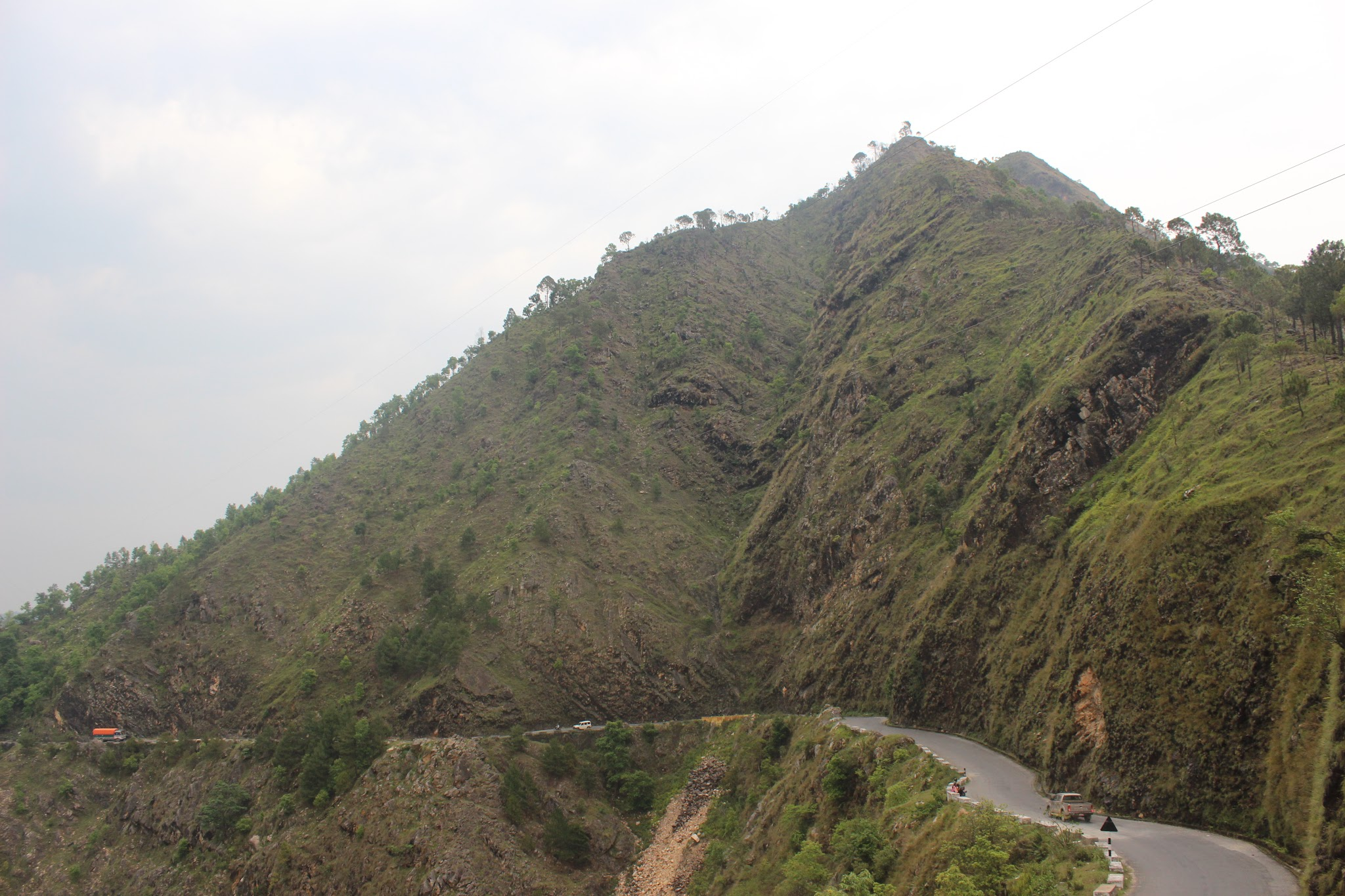 नेपाली: भालुपहाड